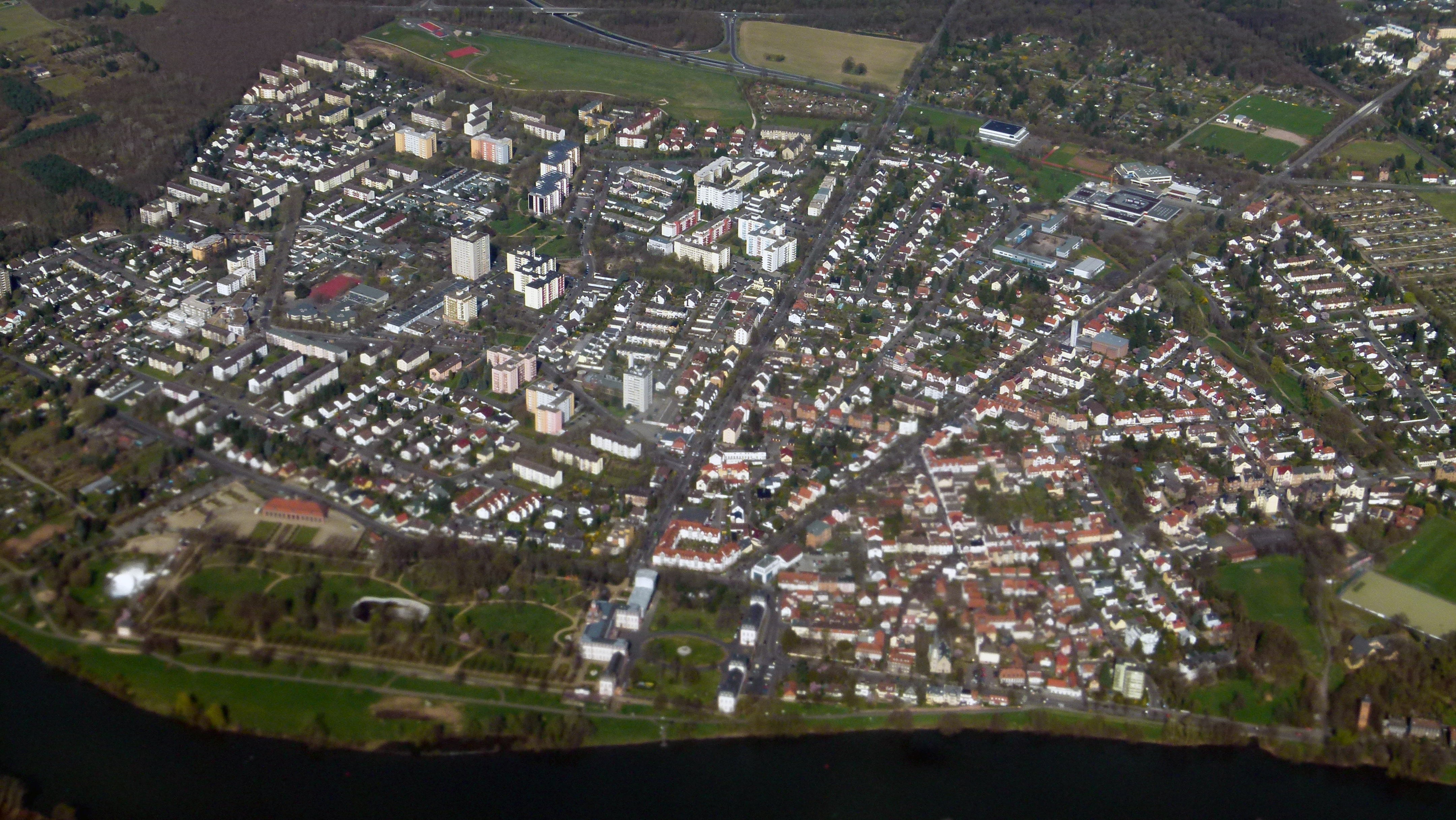 Luftbild von Hanau